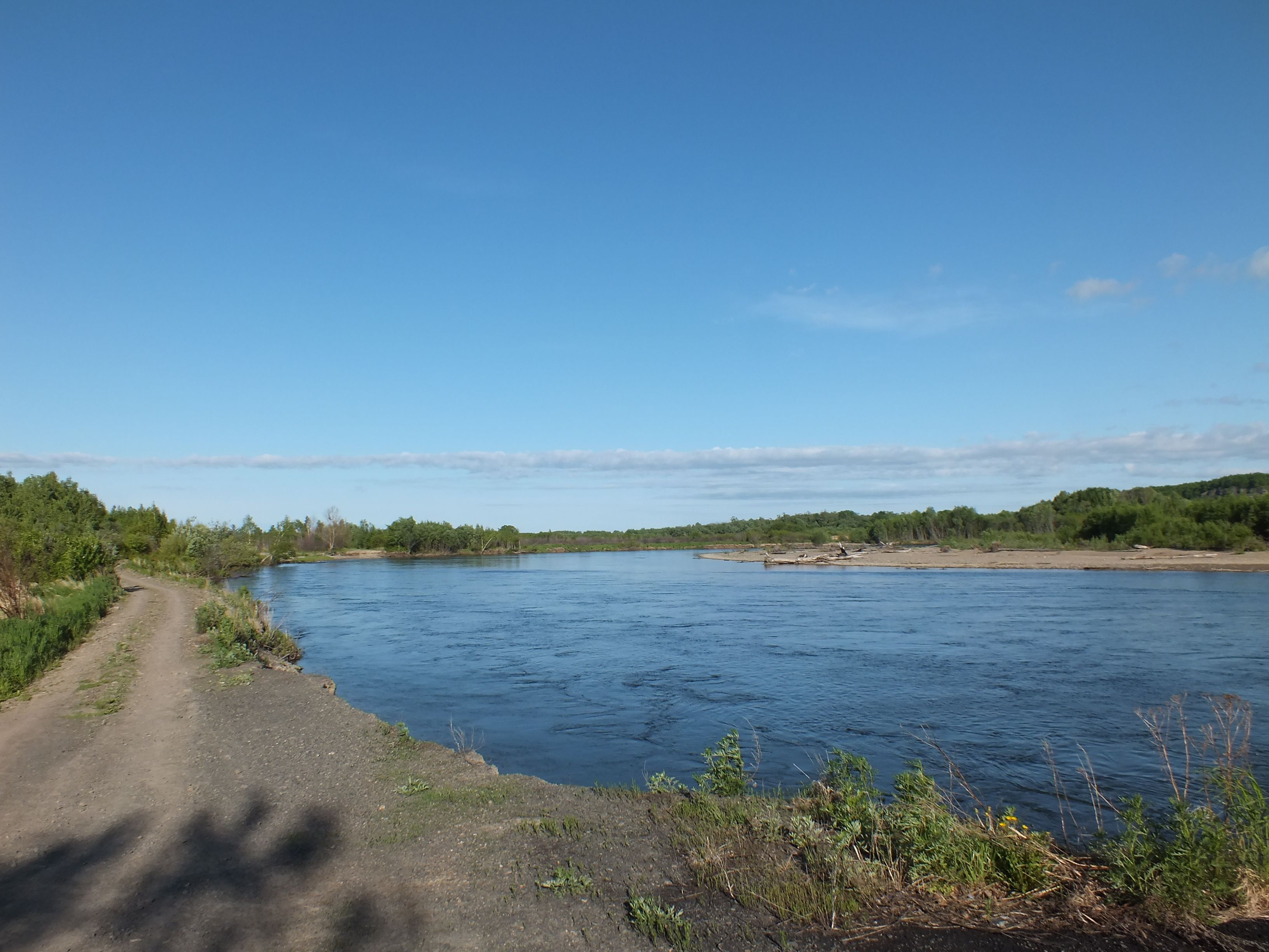 Река Гур, Хабаровский край